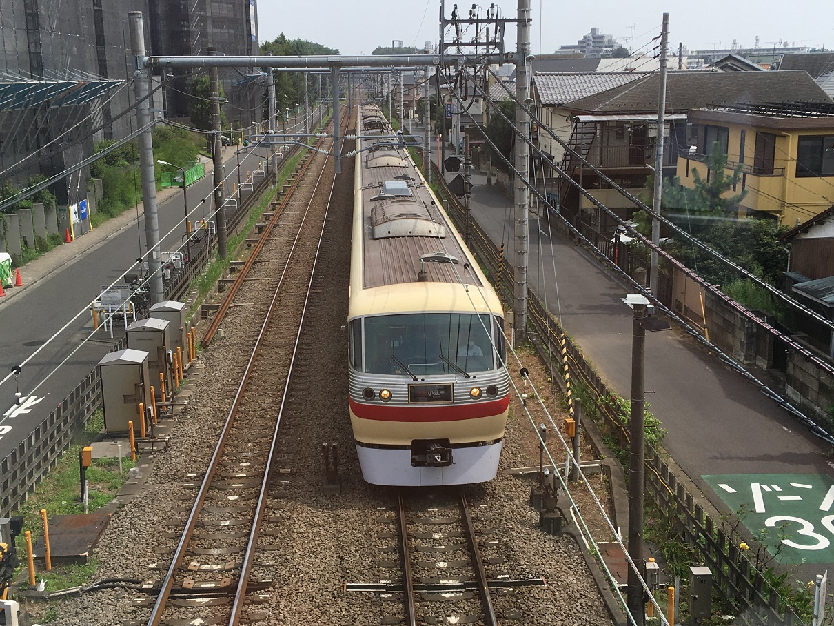 小平 - 久米川間